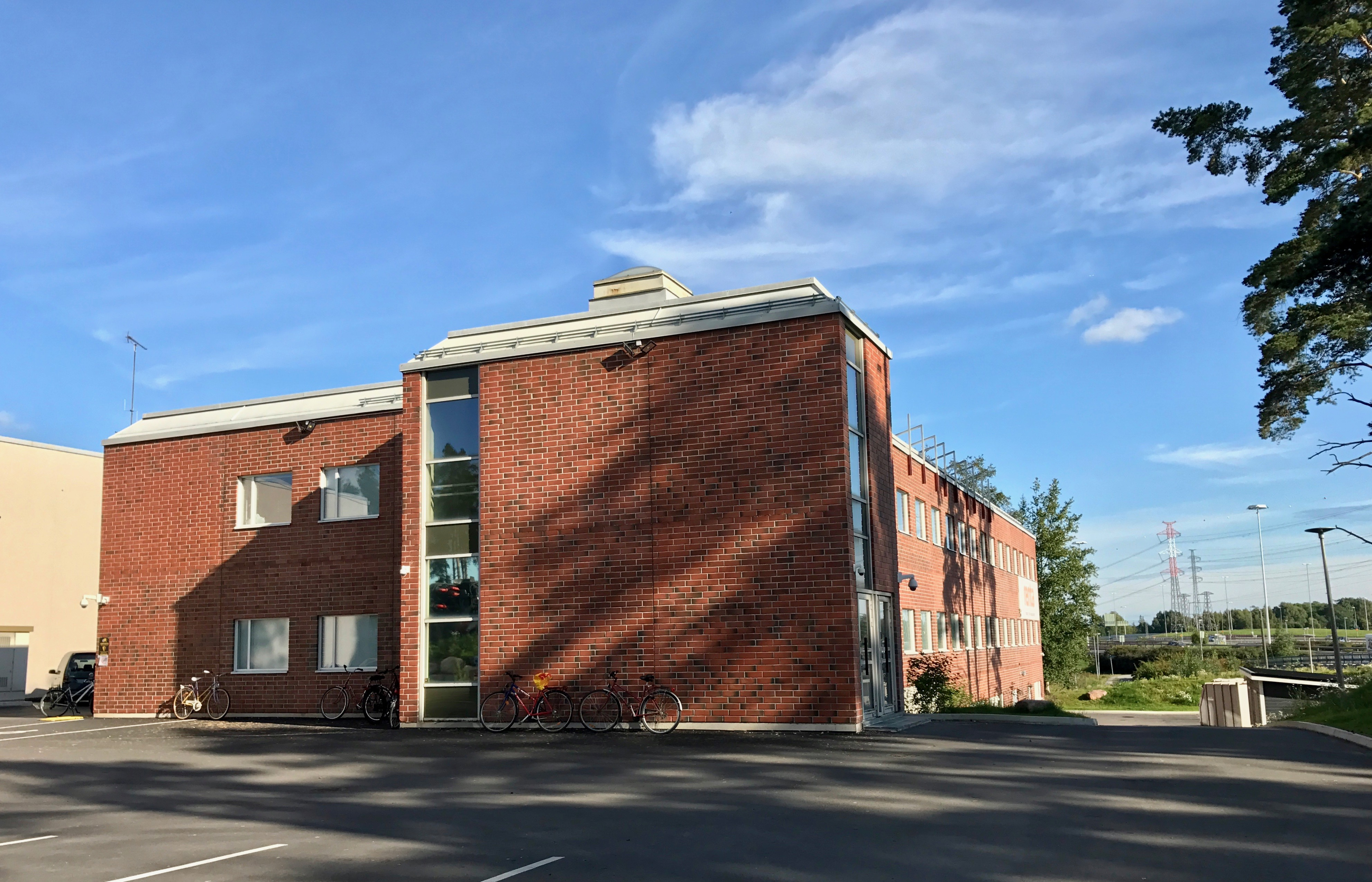 SPR:n ylläpitämä Vantaan vastaanottokeskus Kiinteistö Oy Auramo-Talon tiloissa Vantaan Veromiehen kaupunginosassa.